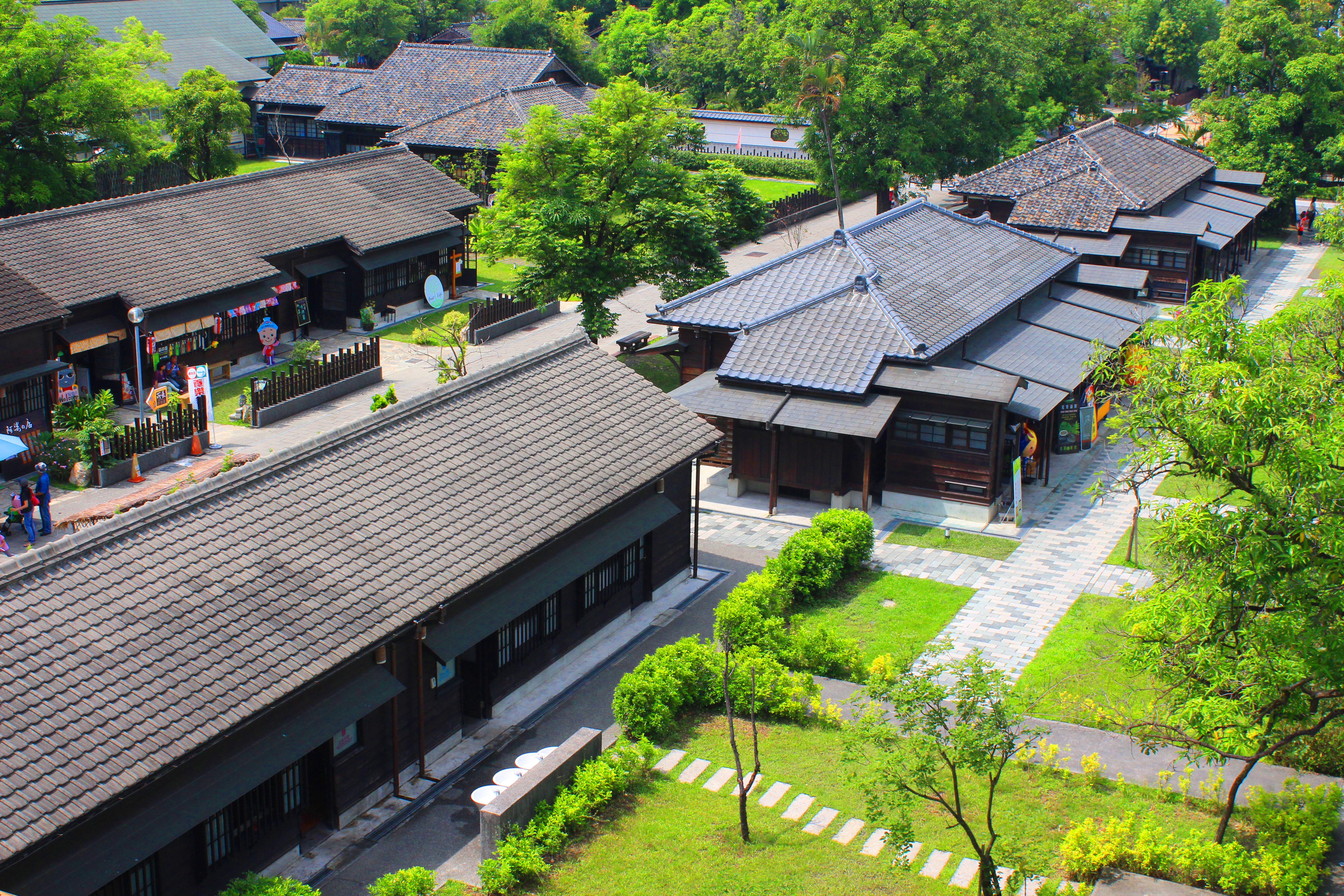 檜意森活村園區總面積約3.4公頃，以1914年（大正3年）搭建的林業日式宿舍為重點，主要有28棟日式檜木歷史建築、1棟市立古蹟、全台唯二的都鐸式建築、及新建的一心二葉館為主體建築